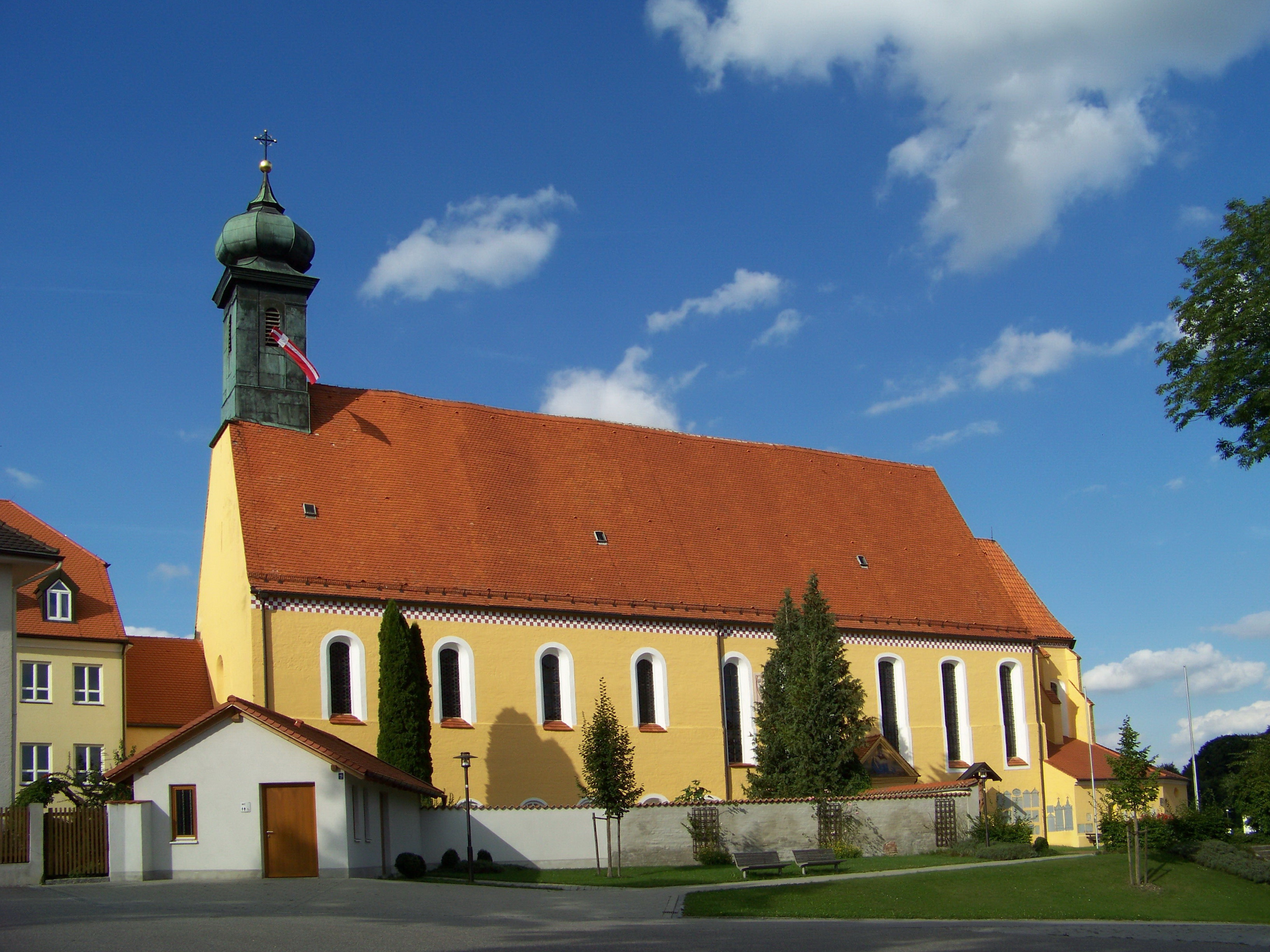 Niederviehbach, Klosterkirche, heutige Pfarrkirche St. Maria.